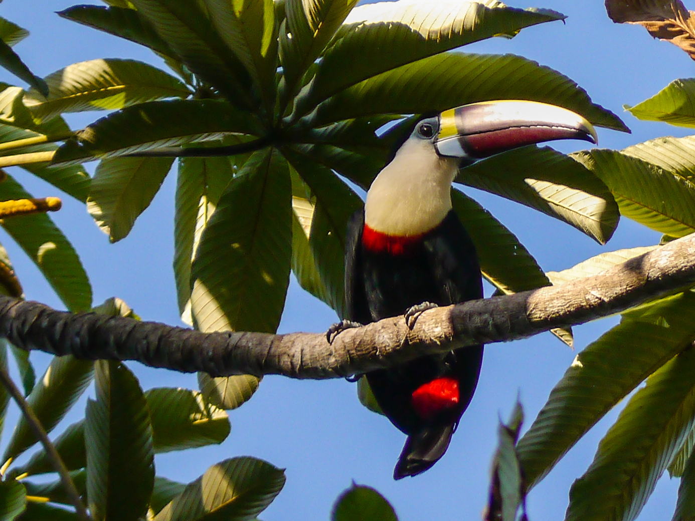 Iwokrama Rainforest, Guyana